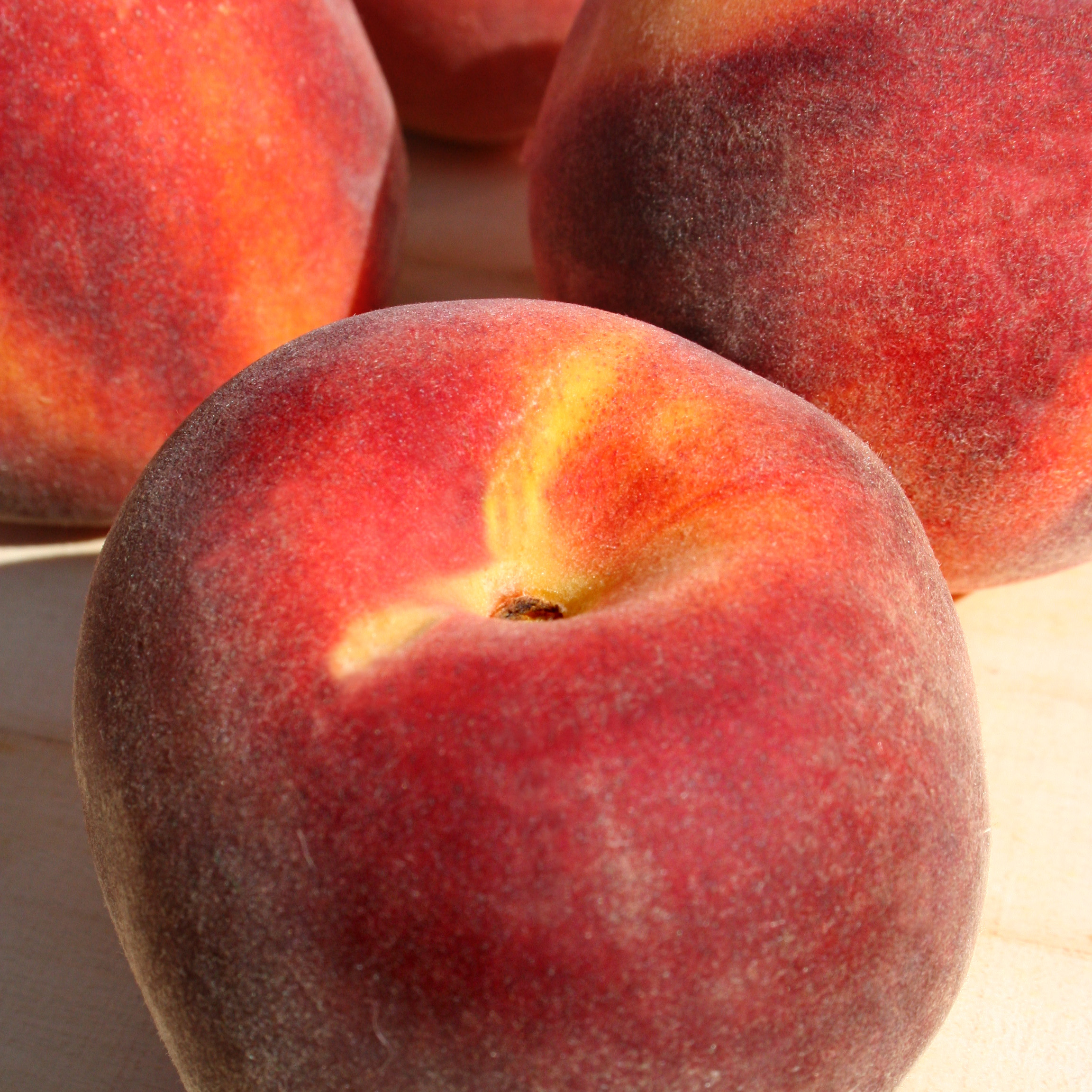 Őszibarack - Peach